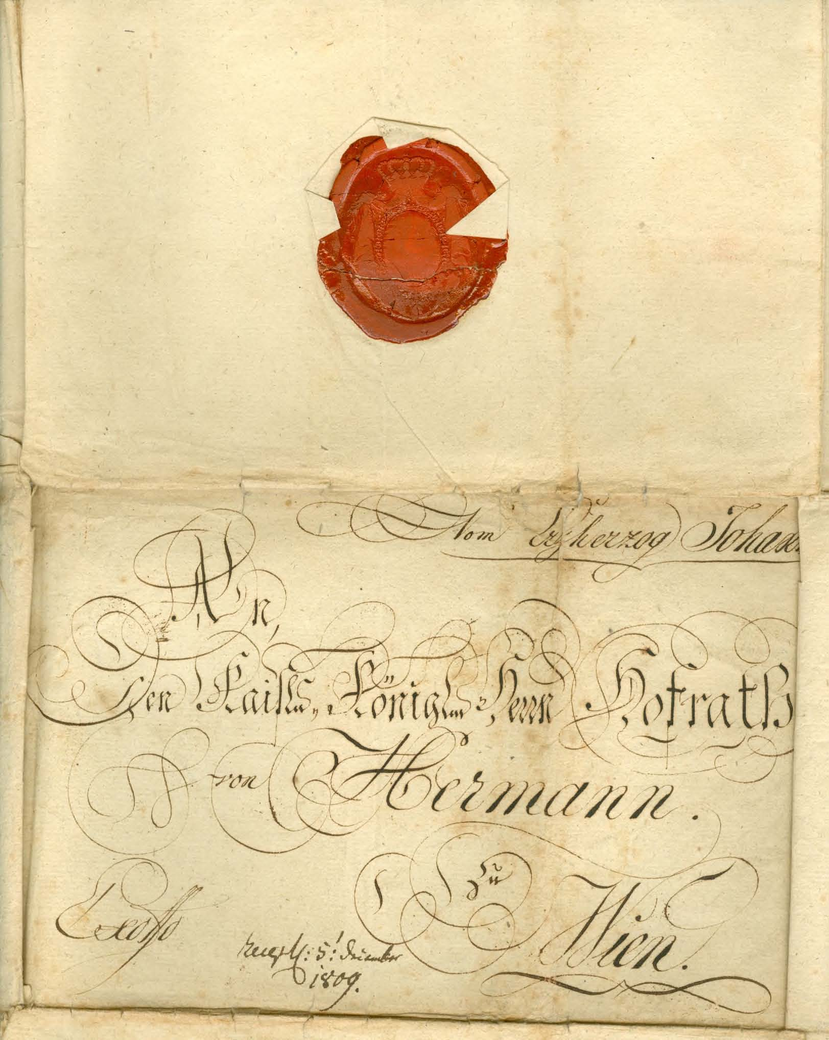 Brief von 1809 Erzherzog Johann an den Vater von Johann Herman von Hermannsdorf Briefanschrift